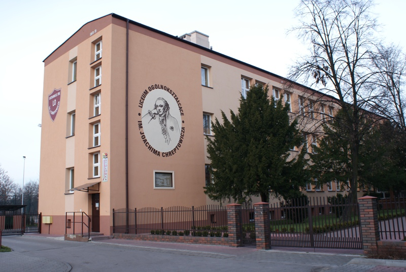 Liceum Ogólnokształcące nr II im. Joachima Chreptowicza w Ostrowcu Świętokrzyskim